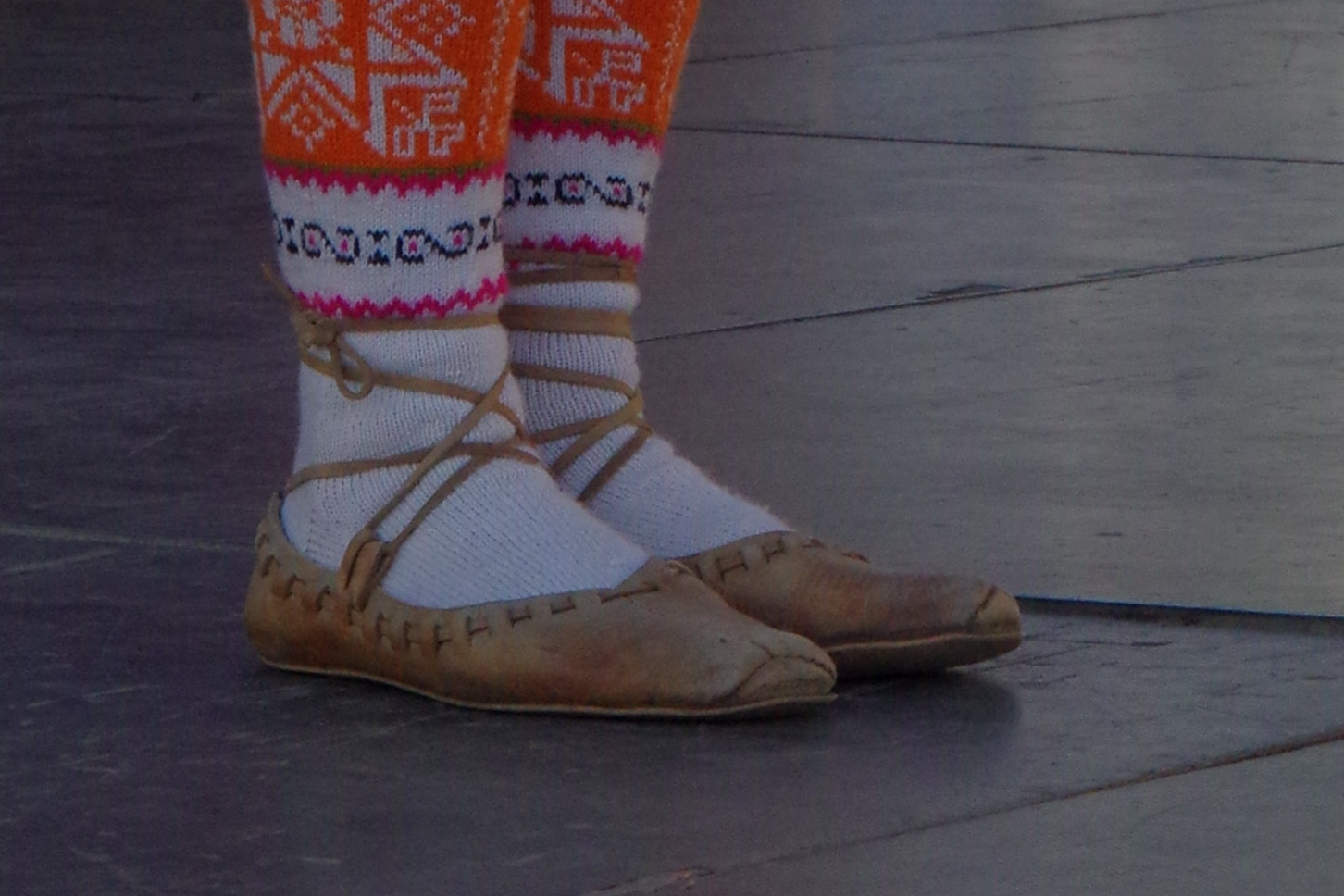 Pastlad